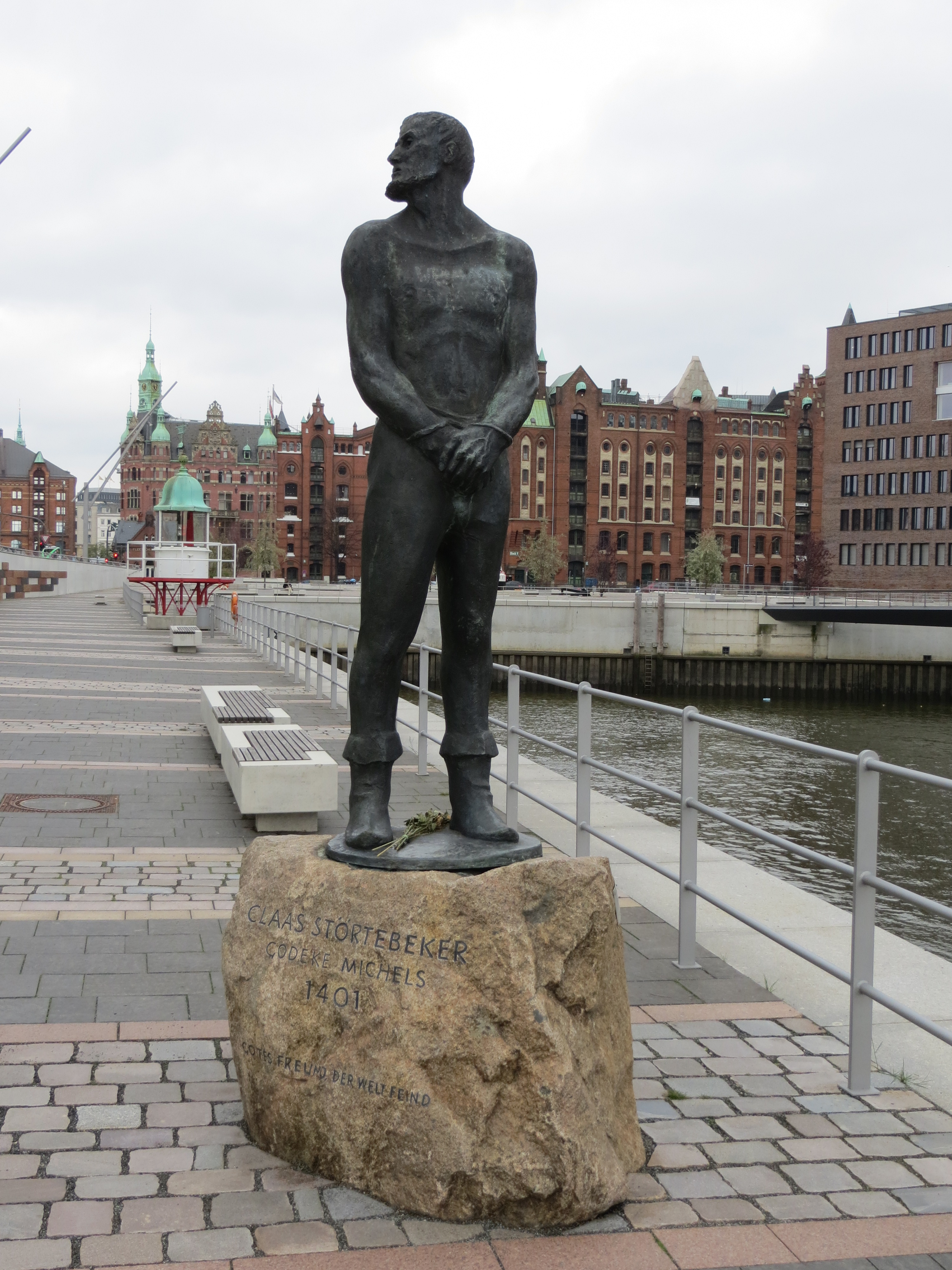 Klaus Störtebeker Statue (Hamburg)